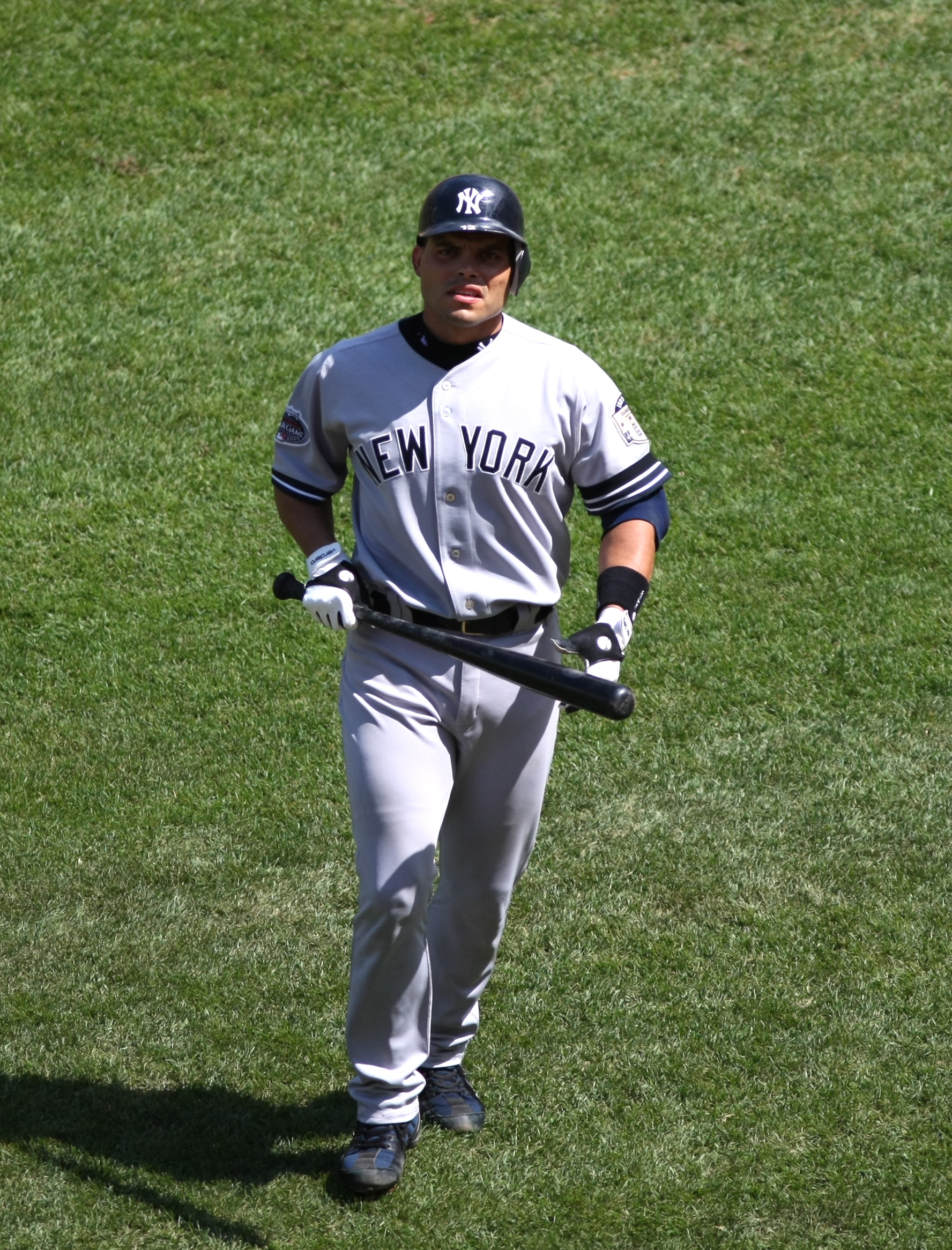 Iván Rodríguez